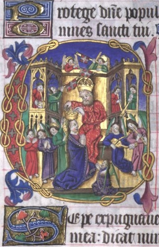 Ausschnitt aus fol. 36v (Blatt 74) des Stundenbuchs von Herzog Amadeus VIII. von Savoyen: Musikanten und Sänger bei der Marienkrönung